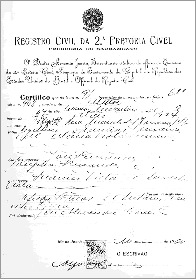 Certificat de naixement de Millôr Fernandes, on es constata la grafia dubtosa del nom «Milton», fet que féu que a partir dels 17 anys l’escriptor passés a signar com a «Millôr».